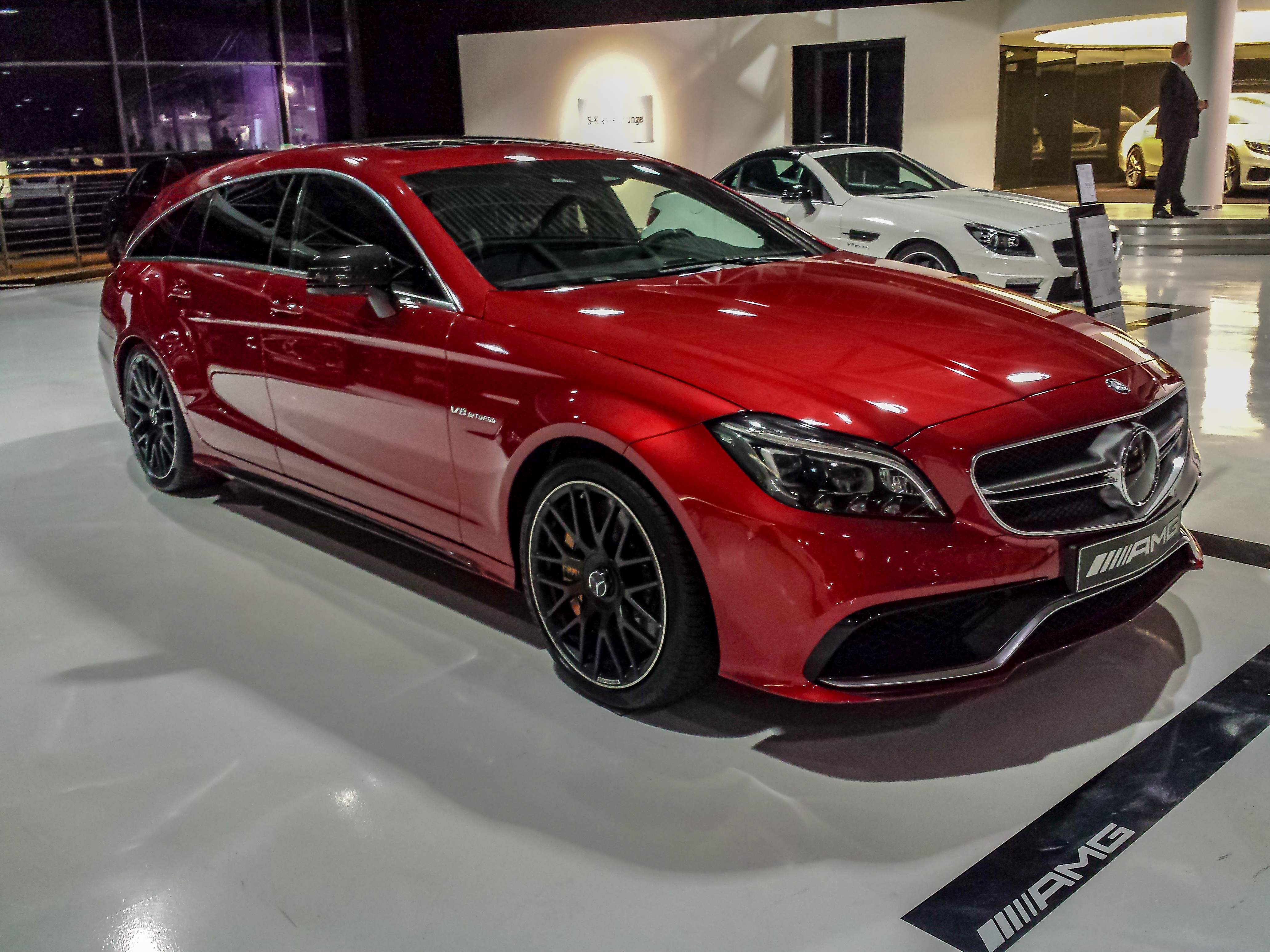 Tag der Logistik 2015, Mercedes-Welt am Salzufer, Berlin